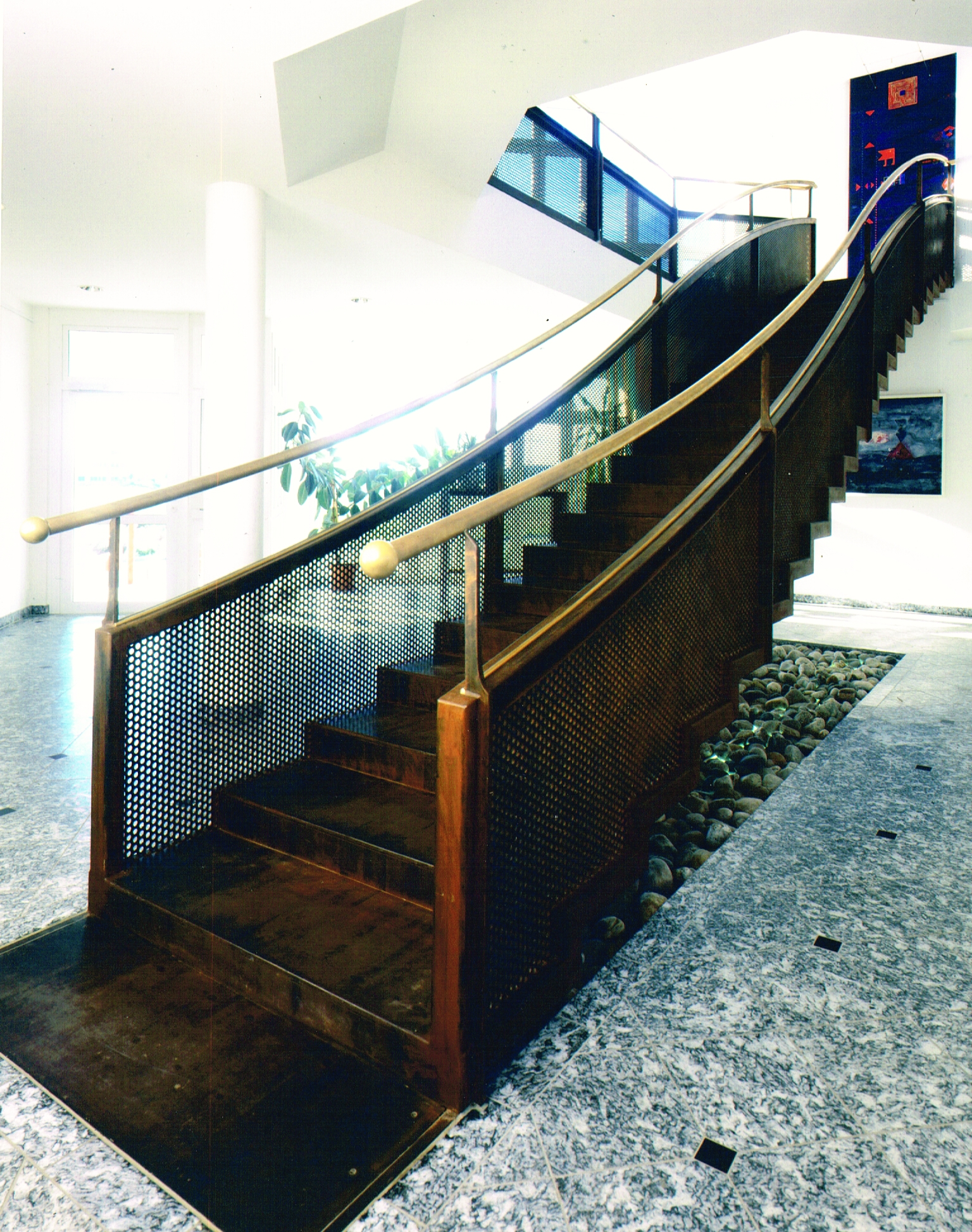 Die Stahltreppe wurde von Werner Bäumler-Laurin für ein Büro- und Verwaltungsgebäude nach seiner Theorie entworfen und 1994 eingebaut. Ausgeführt wurde die Sinustreppe vom Metallgestalter Matthäus Seisenberger. Die Treppe ist 1,4 Meter breit, 9 Meter lang und überwindet eine Höhendifferenz von 3,26 Metern. Die Hohlkörper der Stahlstufen sind schallgedämpft, der Handlauf besteht aus Messing.